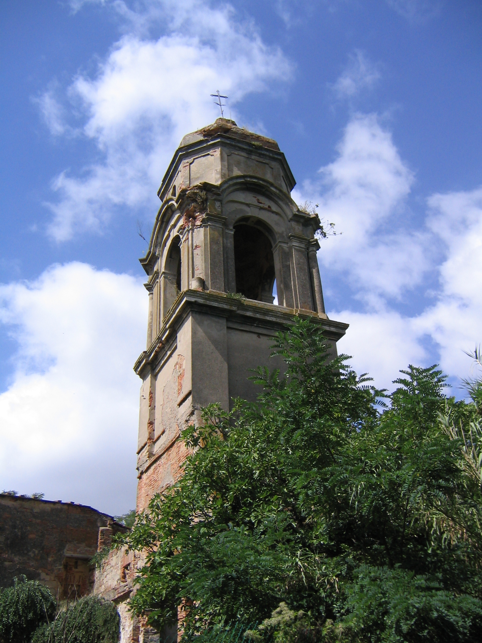 campanile chiesa vecchia